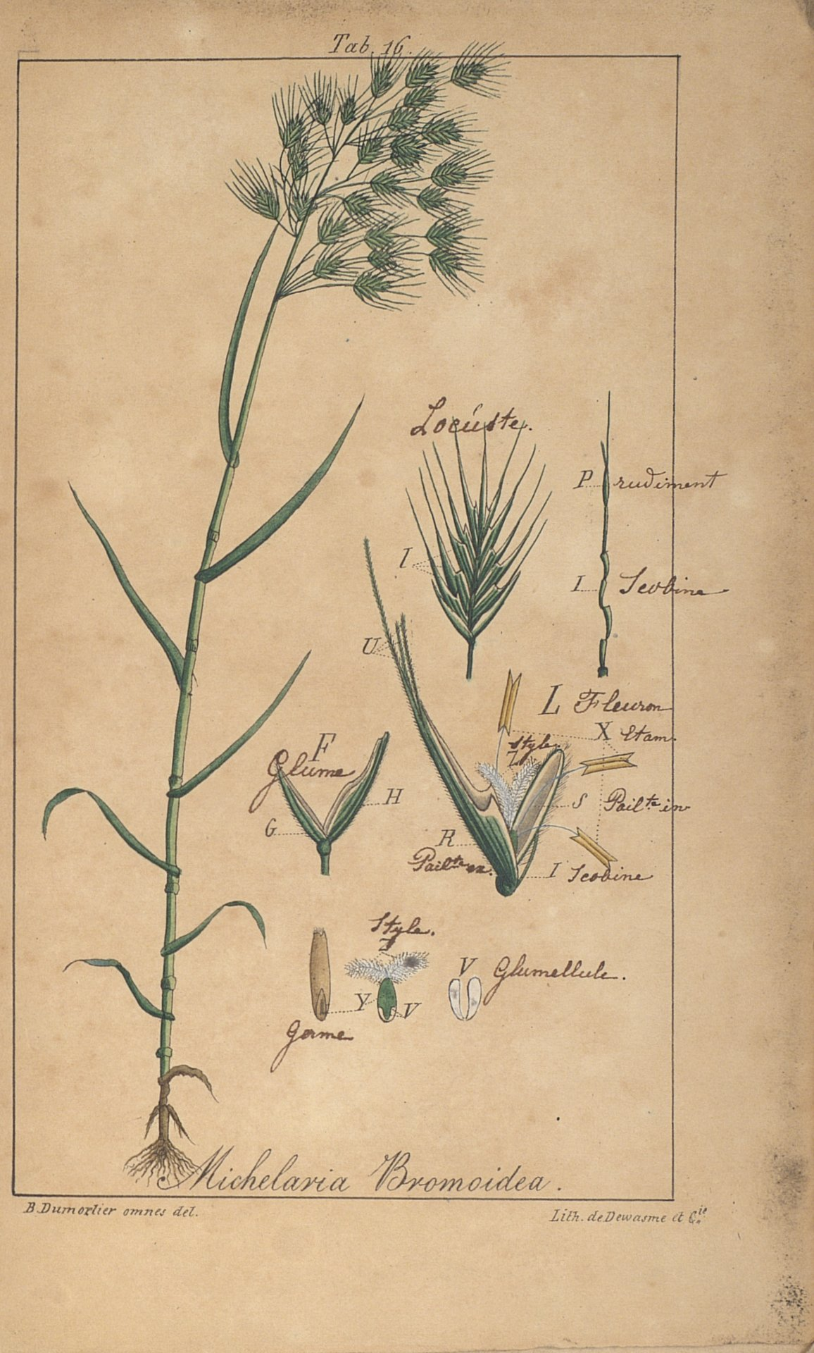 Planche originale de la description de Michelaria bromoidea (syn. Bromus bromoideus) (Observations sur les Graminées de la flore belgique, Par B.C. Dumortier, Tournay, Imprimerie de J. Casterman, 1823 , planche 16)